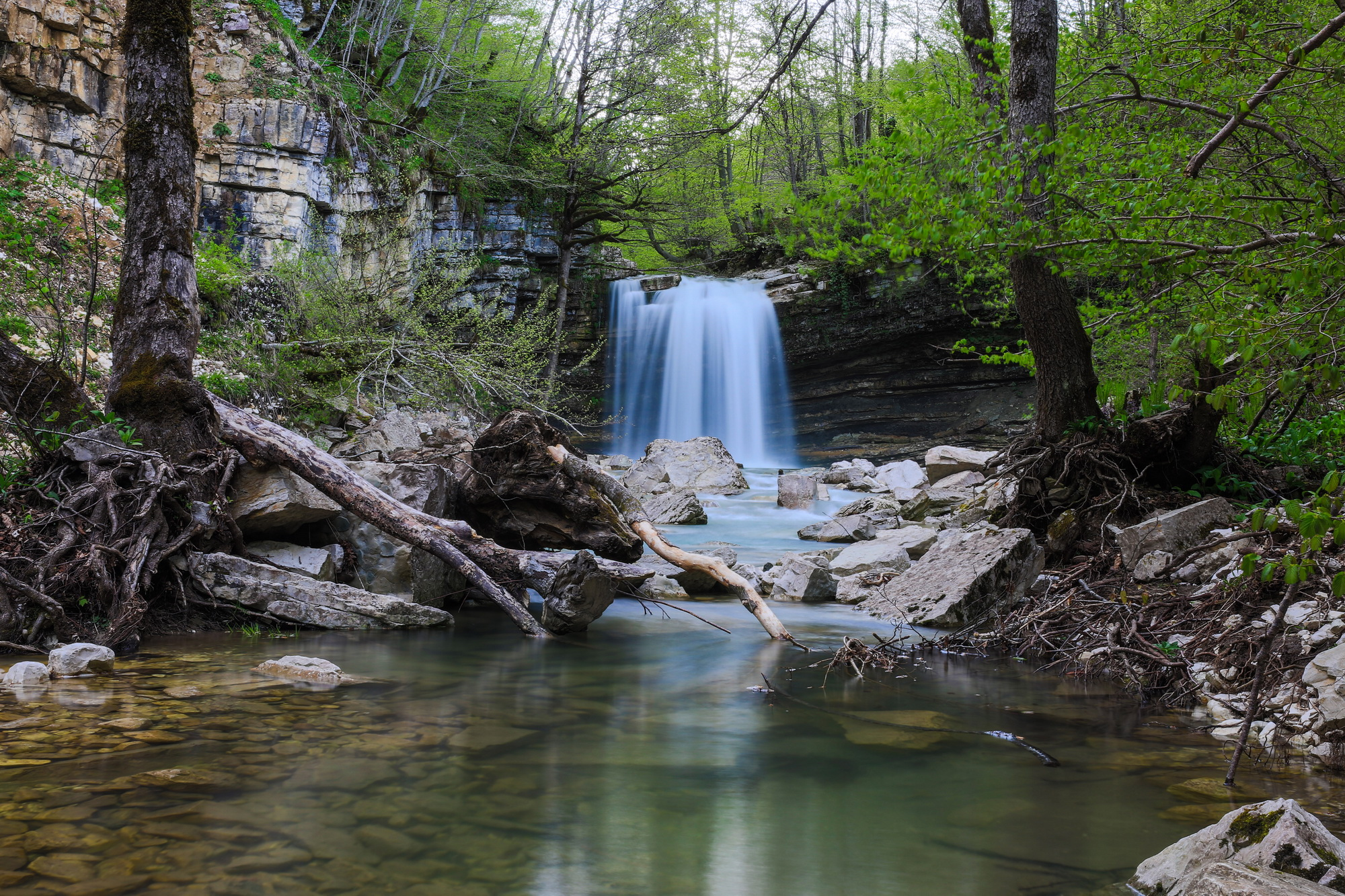 ოკაცეს (კინჩხას) ჩანჩქერის ბუნების ძეგლი ღირშესანიშნაობა: ბუნების ძეგლი წარმოადგენს მდ. საწისქვილოს ხეობაში, ასხის კირქვული მასივის აღმოსავლეთ ქარაფიდან, სამ საფეხურად გადმომავალ ჩანჩქერების კასკადს. ზედა ორი საფეხური მდ. საწისქვილოს მარჯვენა შენაკადზეა წარმოქნილი, პირველის სიმაღლე დაახლოებით 25 მ-ია ხოლო მეორე ჩანჩქერის სიმაღლე 70 მ-მდე აღწევს. ნაკადის მდ. საწისქვილოსთან შეერთების შემდეგ 20 მეტრში წარომიქმნეაბა კასკადის მესამე დაახლოებით 35 მ სიმაღლის საფეხური. მდებარეობა: ხონის მუნიციპალიტეტი, სოფ. კინჩხას მიდამოები, 843 მეტრი ზღვის დონიდან. კოორდინატები: N42 29.738 E42 33.032